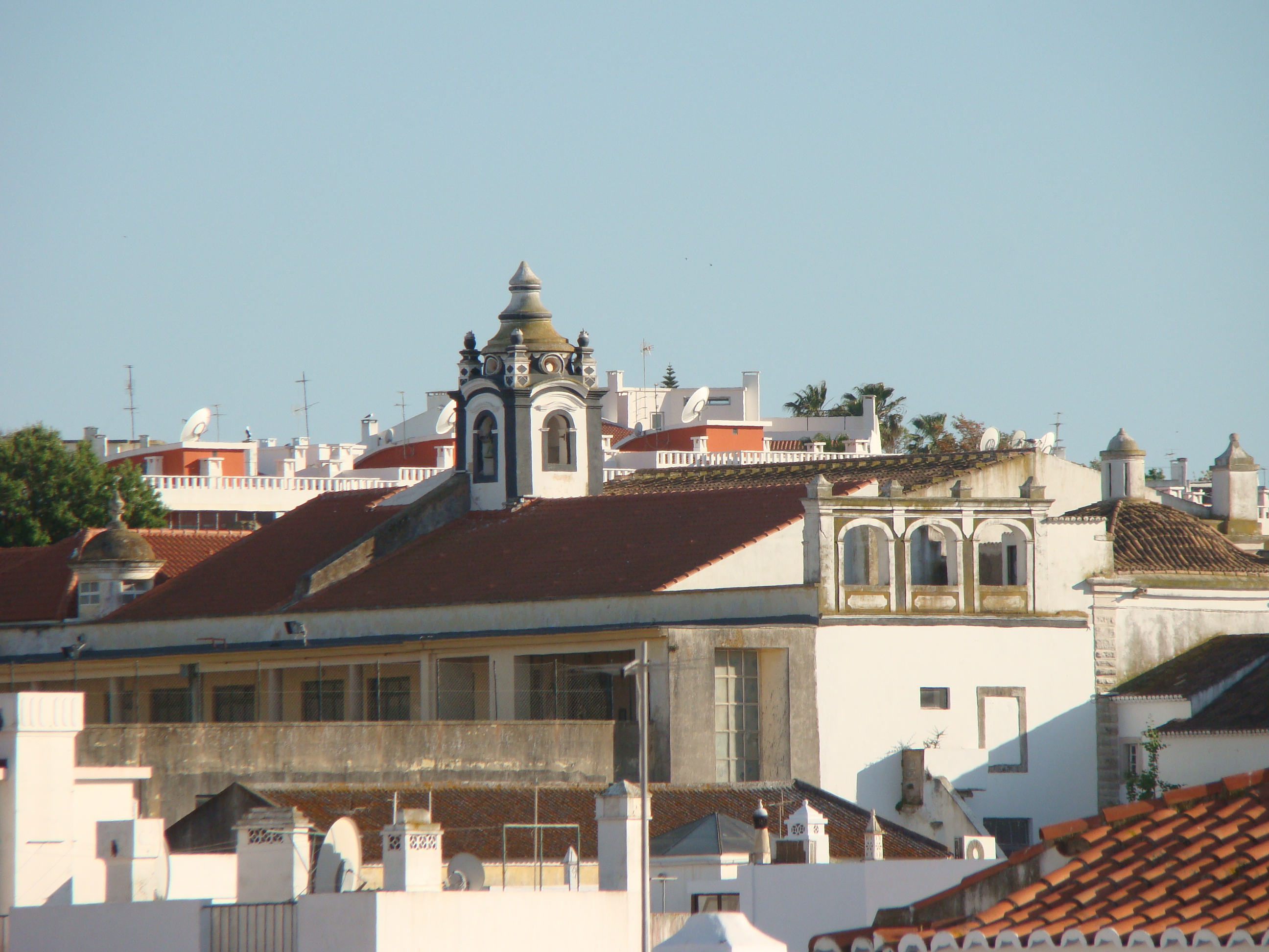 Convento de Nossa Senhora do Carmo em Lagos, Algarve -16.05.2018